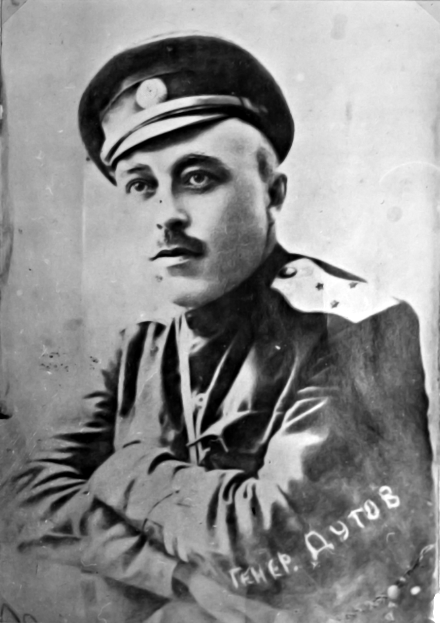 Александр Ильич Дутов (1879—1921), атаман Оренбургского казачества